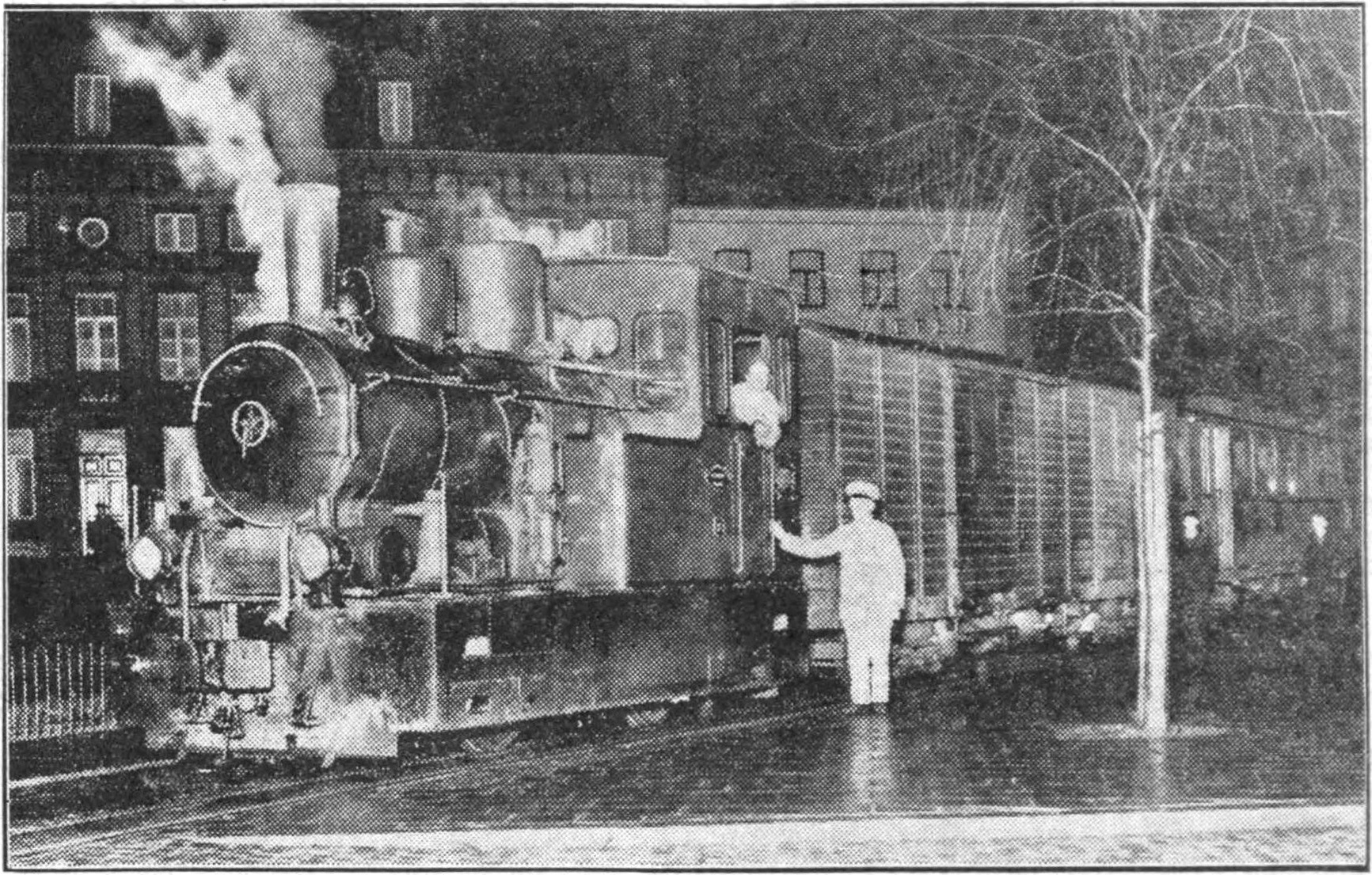 De tram Roermond–Ittervoort heeft Maandag voor het laatst gereden.... Autobussen zullen den dienst overnemen. Afkomstig uit de Limburger Koerier, dinsdag 22 januari 1935, p. 3.